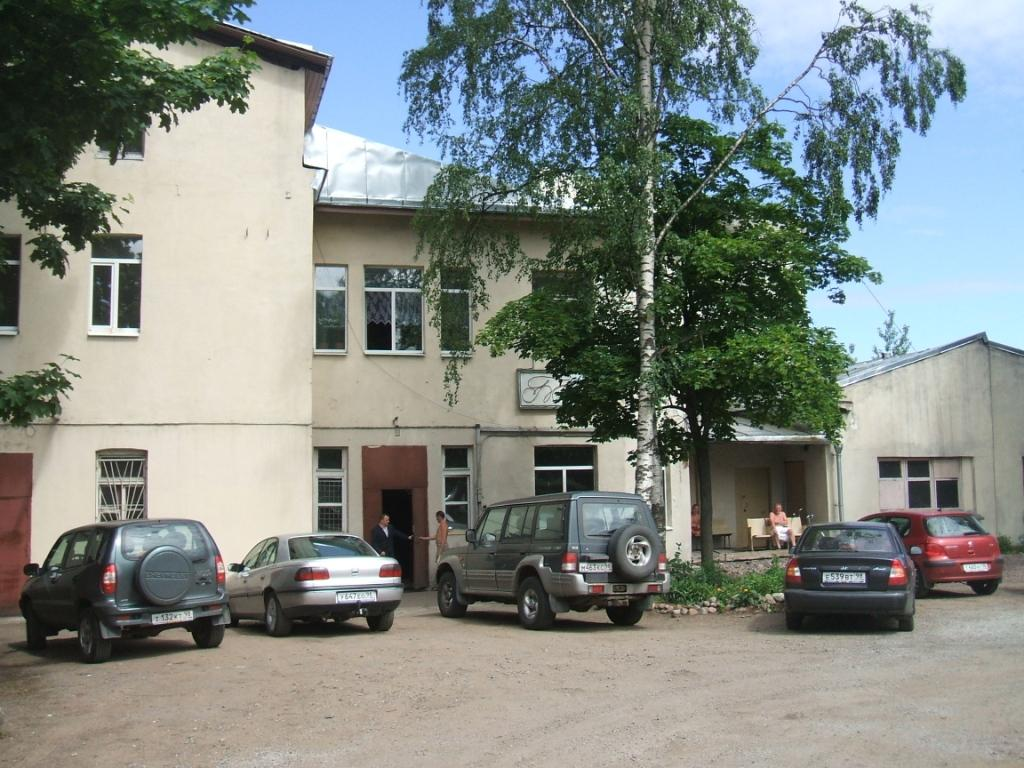 Фотография общего вида коммунальной бани в Сестрорецке СПб